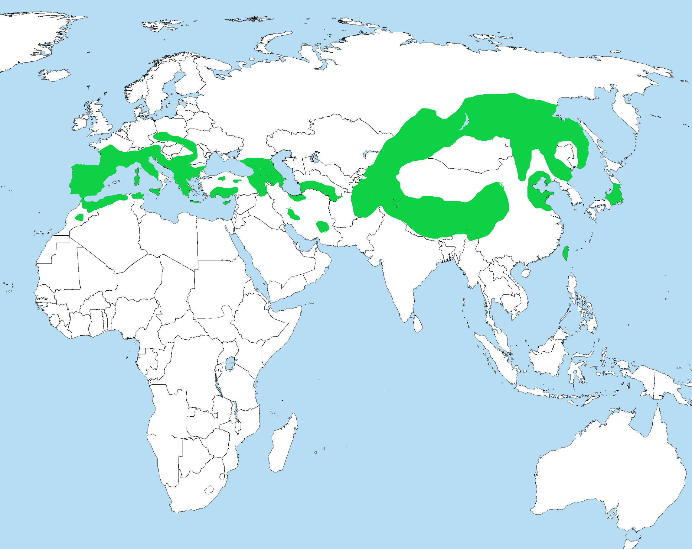 мапа поширення Prunella collaris